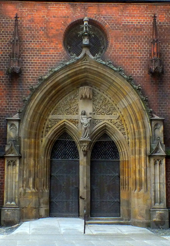 Legnica, katedra pw. śś Apostołów Piotra i Pawła